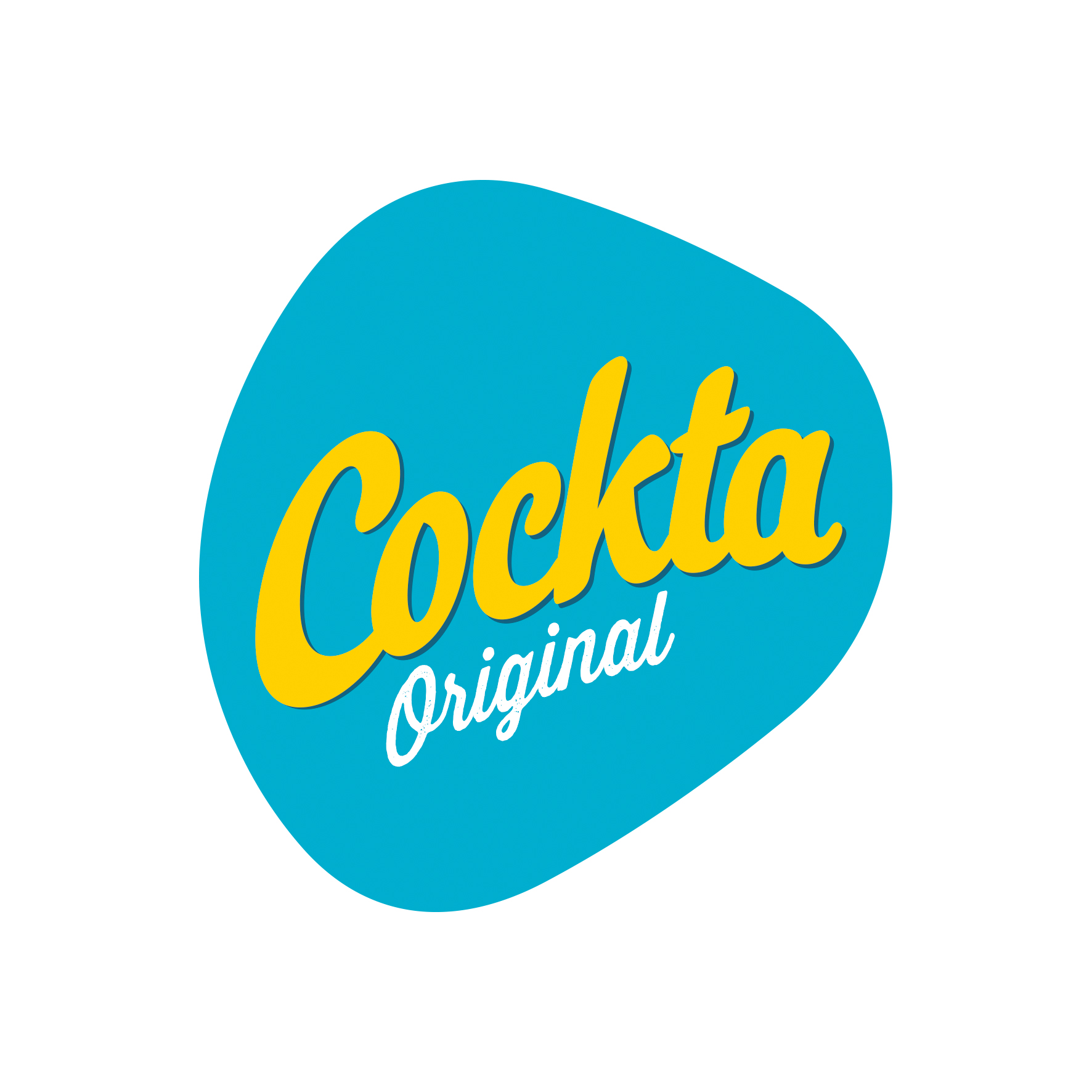 Logotip Cockte